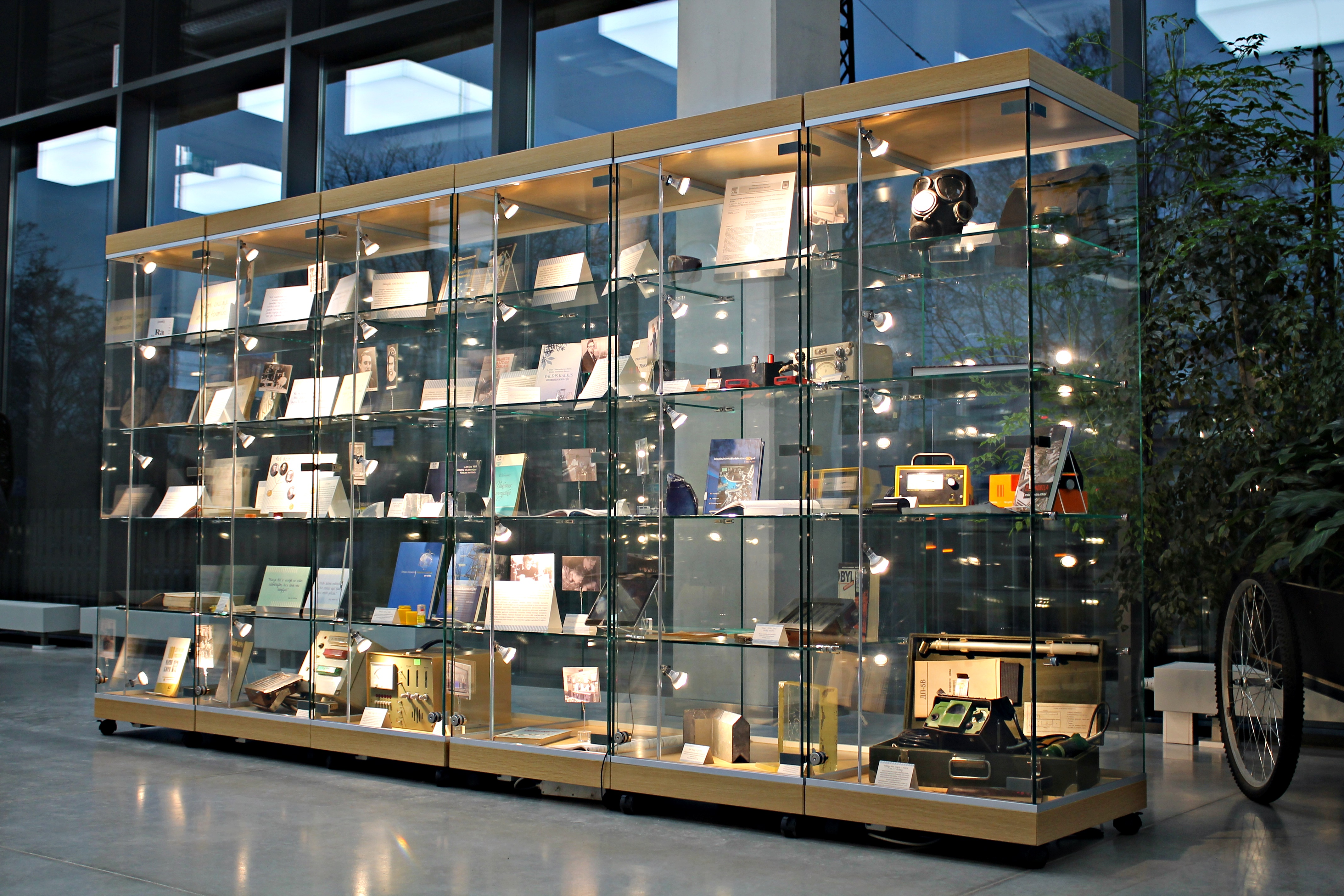 “Atomi, enerģija un Kirī fenomens”